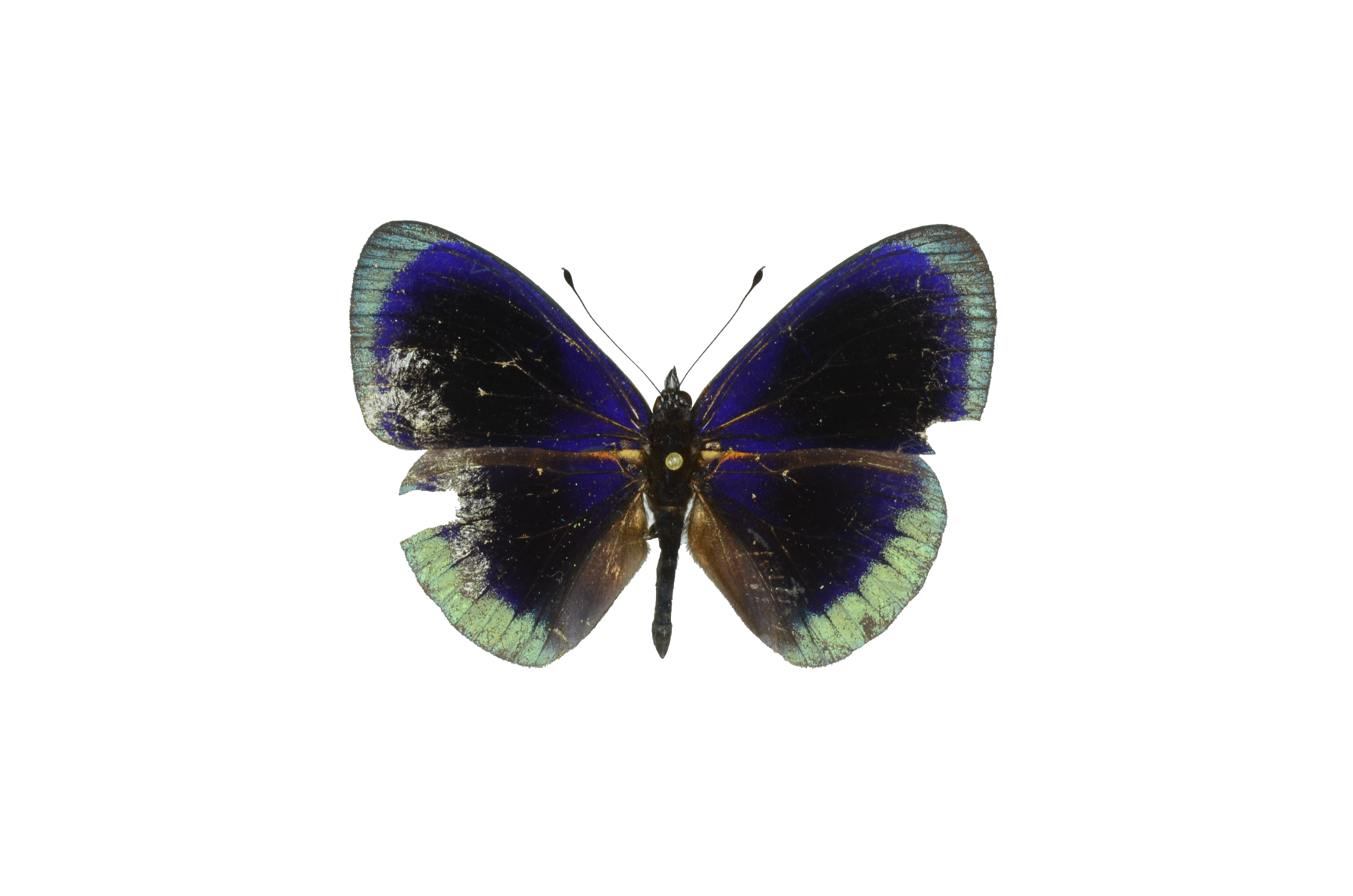 eastern Ecuador